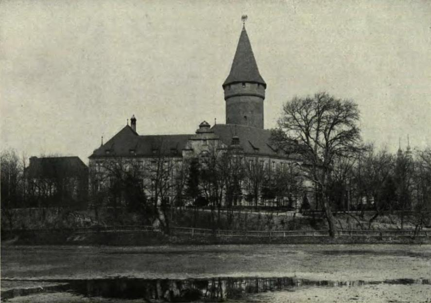 Das Piastenschloss in Oppeln vom Schlossteich aus.